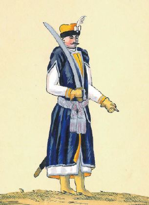 51. Szef Buławy Litewskiej Kawalerii Narodowej (oficer chorągwi buławy wielkiej litewskiej 2 BKN (petryhorskiej)?